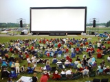 una pantalla inflable AIRSCREEN en el festival de James Dean (Marion, USA)